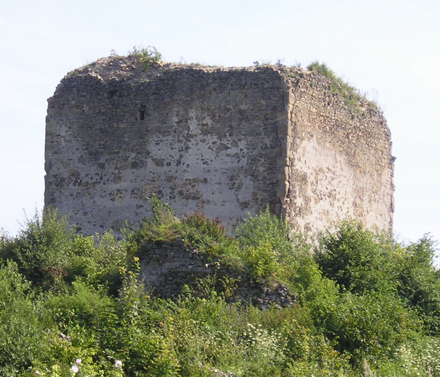 Kategória:Obrázky budov